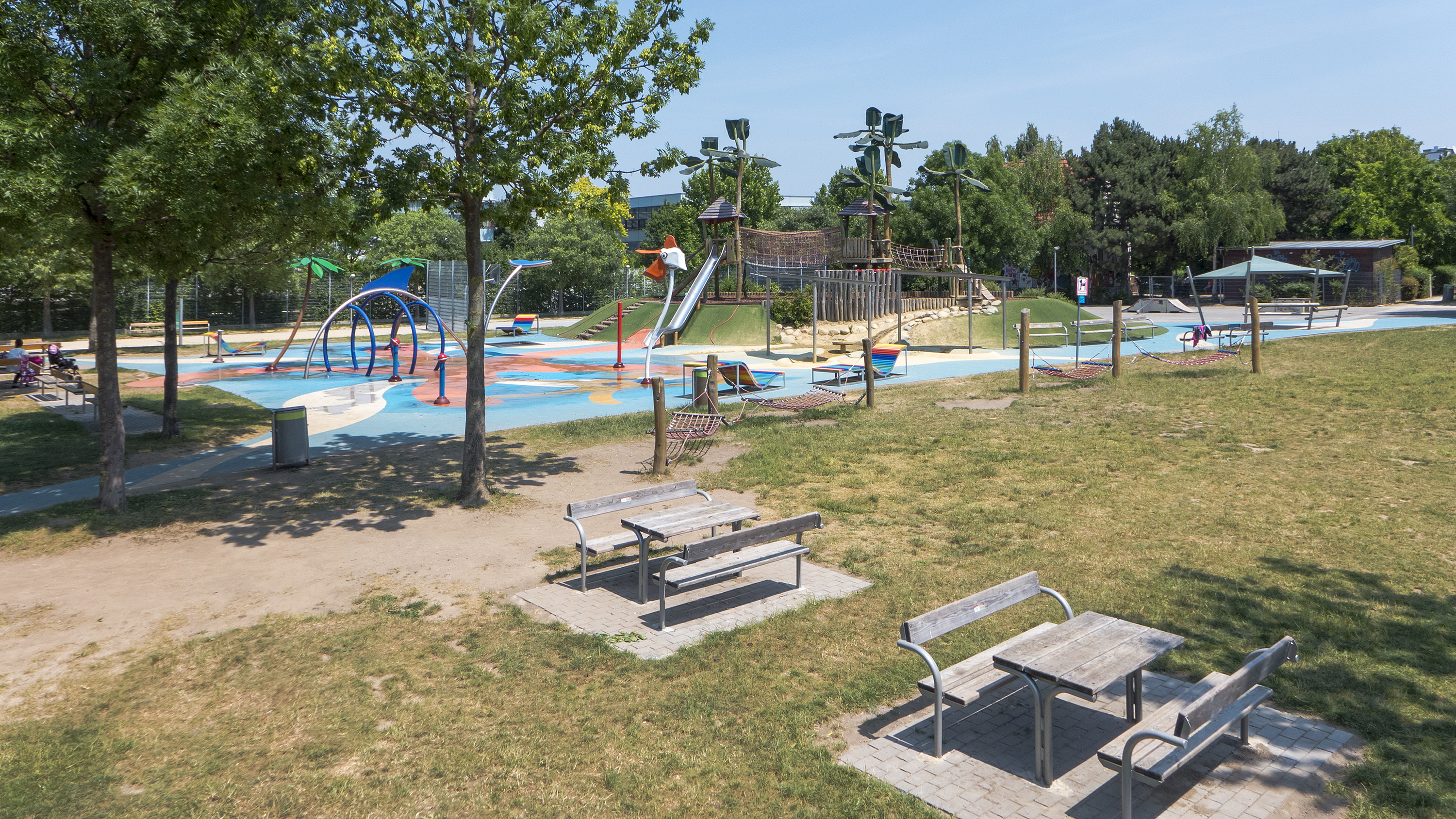 Stadtpark Leberberg in Wien 11